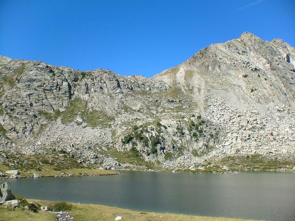 lo Collado, vist des del nord-est de l'Estany de Dellui; la Vall de Boí, Alta Ribagorça, Catalonia